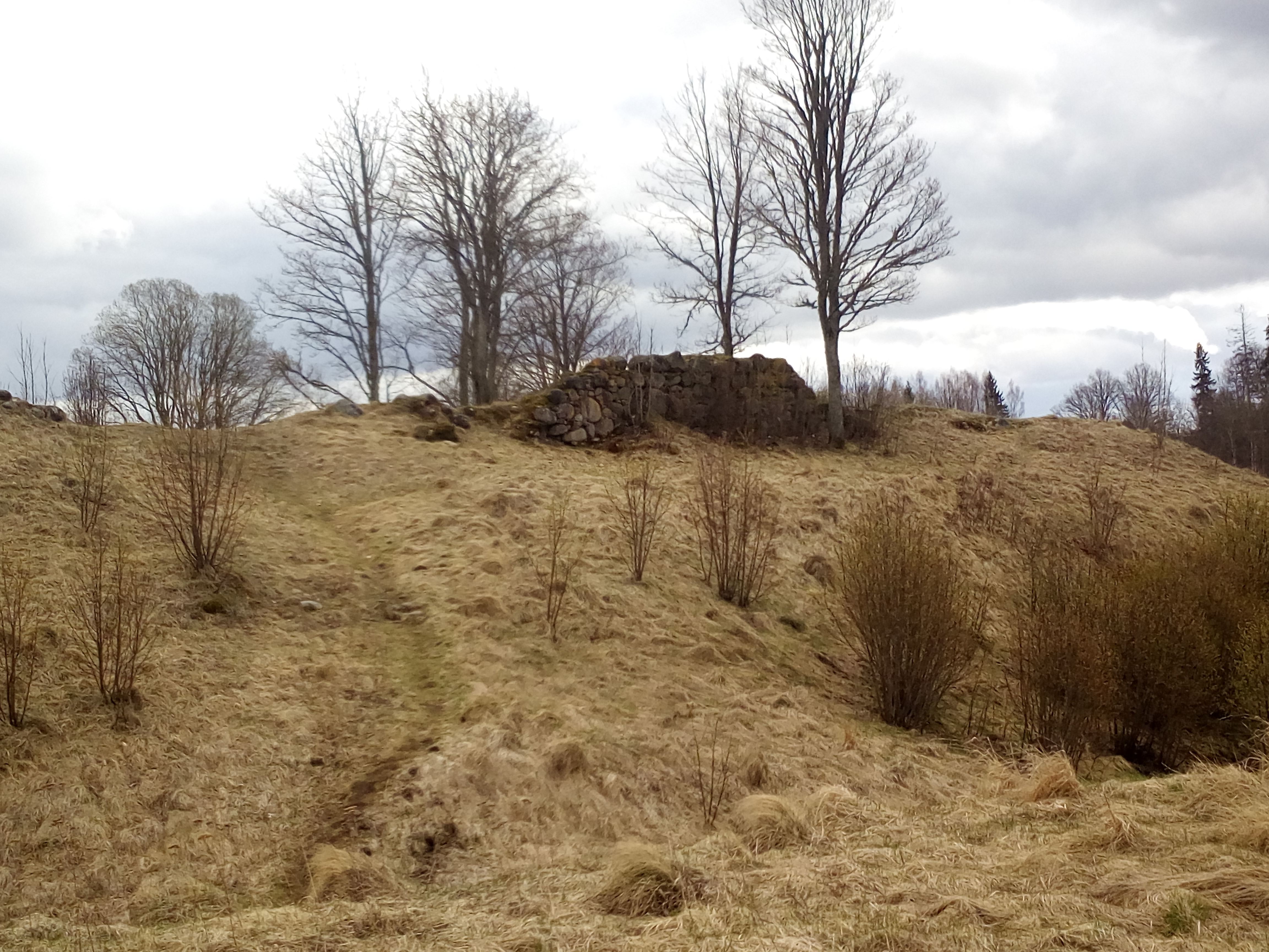 Rūjienas pilsdrupas, 2017